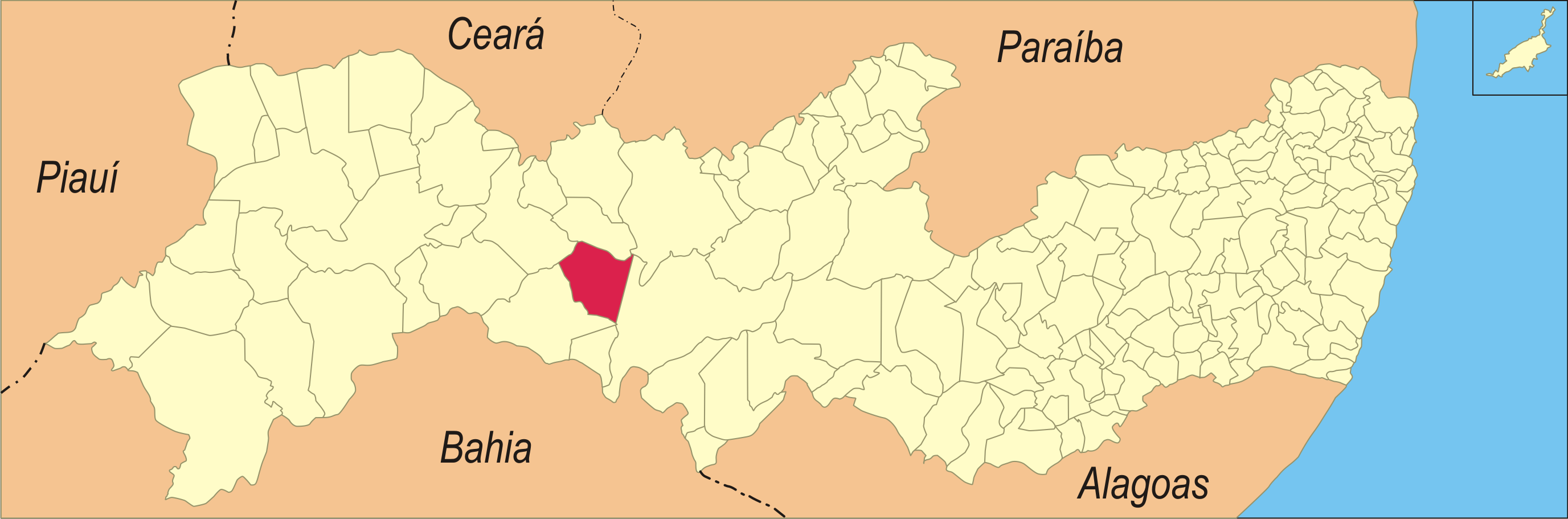 Localização da cidade em Pernambuco